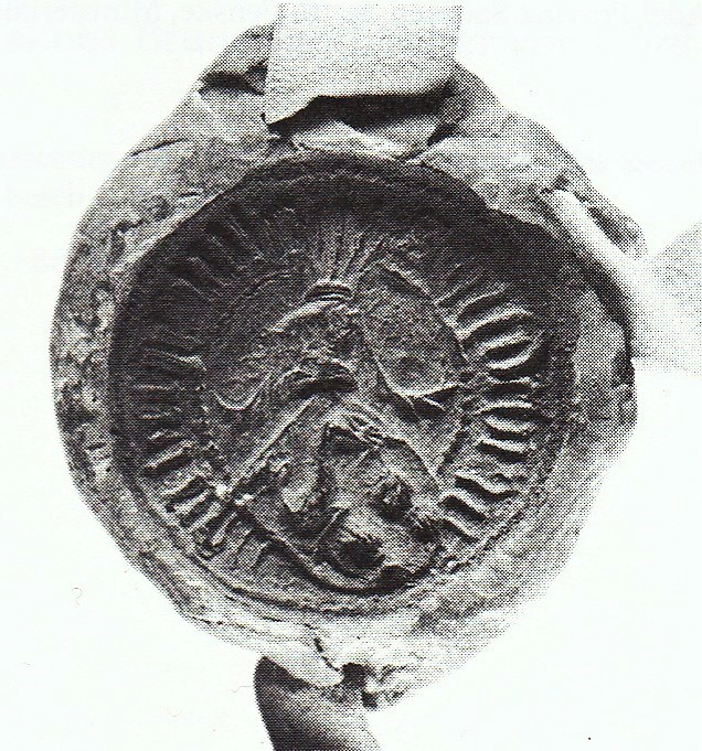 Wachs-Siegelabdruck des Hildebrand von Berwinkel aus dem Jahre 1441. Im runden Feld ein Vollwappen, Schild und Helmzier nehmen den unteren und oberen Bereich der Umschriftzone mit ein. Gelehnter Schild mit Wappenbild: ein Wolf springend über zwei Garben. Helm mit Helmzier: ein Busch aus fünf Federn; Helmdecken. Zwischen zwei Perllinien, in gotischen Minuskeln: S/hildebran(di) van berwinke(l). Anhängend an einer Urkunde mit dem Kloster Mariental vom 25. Juli 1441; Aussteller Jürgen und Hildebrand von Berwinkel. Rund, 27 mm, Wachs braun, leicht beschädigt.